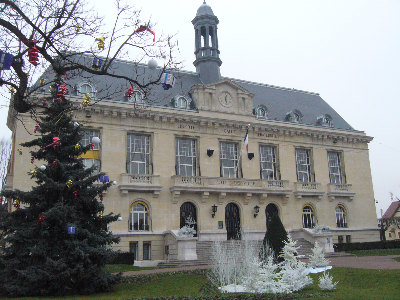 Mairie de la ville de Aulnay-sous-Bois / Aulnay-sous-Bois town hall.